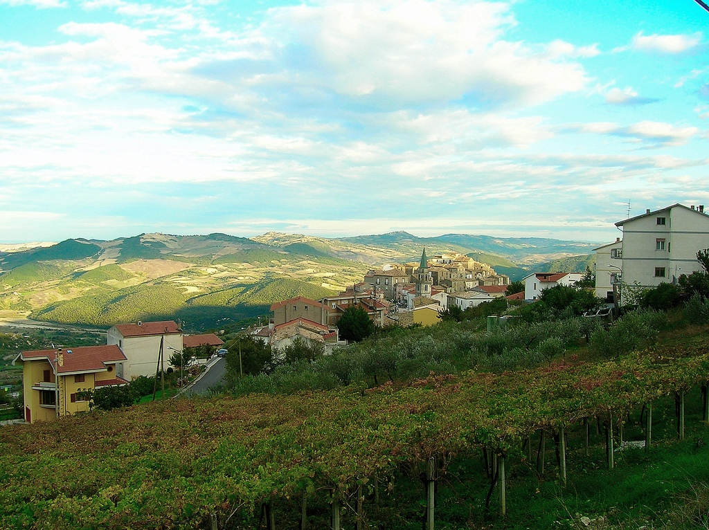 Dogliola